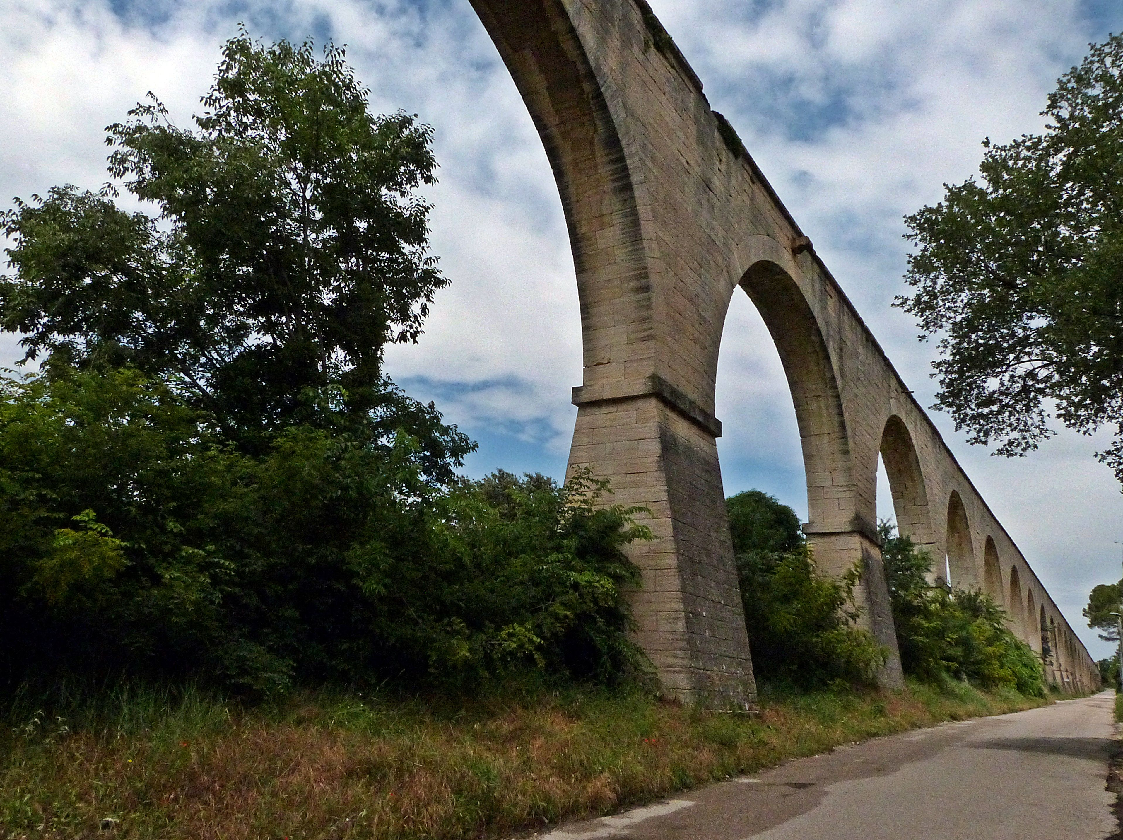 Carpentras: Aquädukt